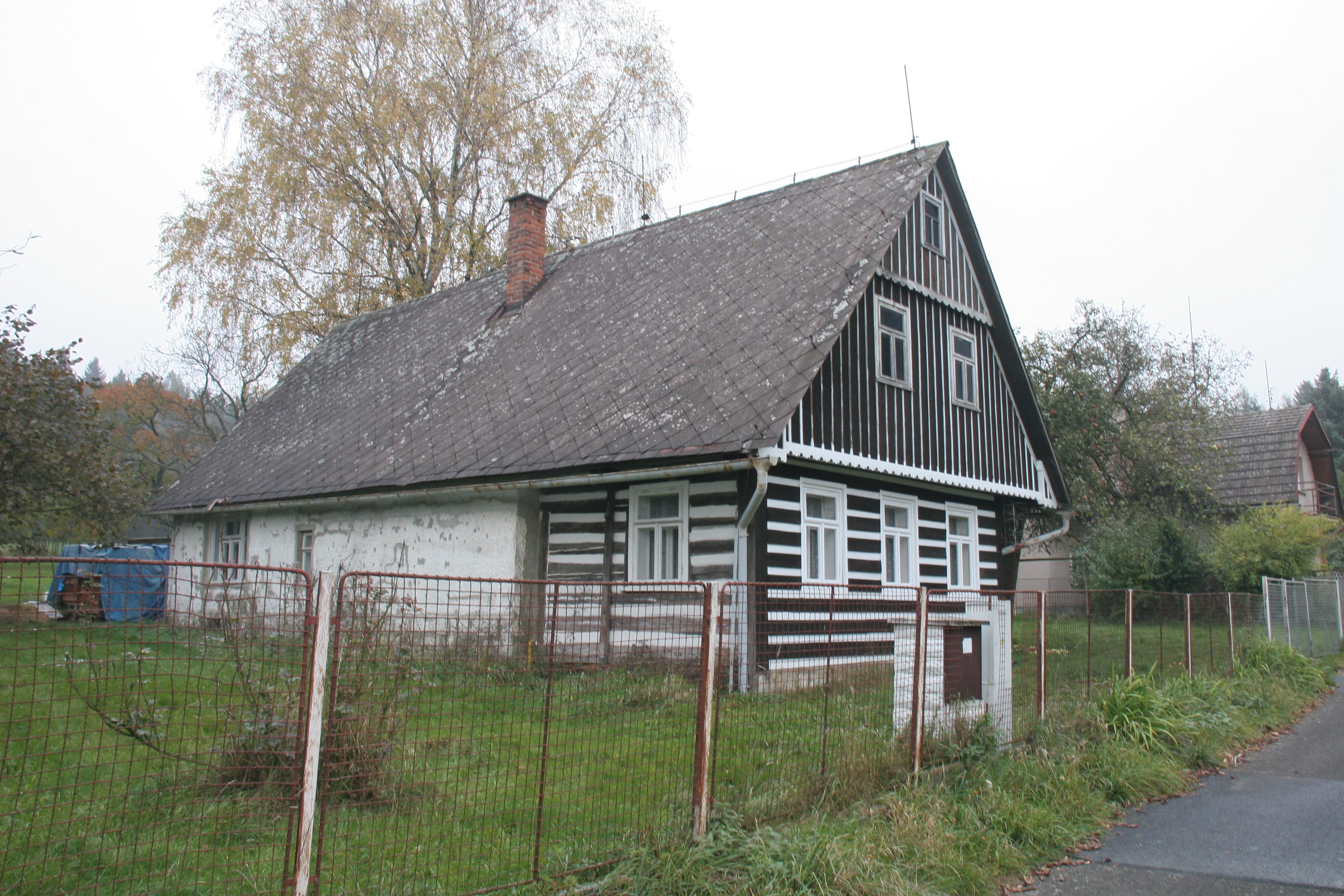 Řečice 17